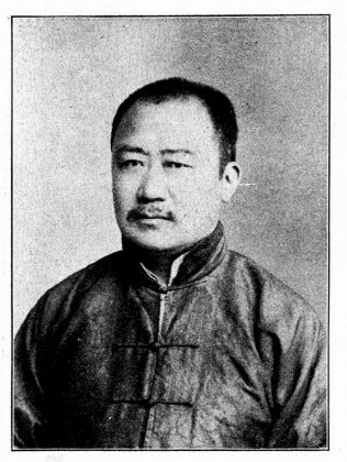 中文（台灣）: 王吉言議員